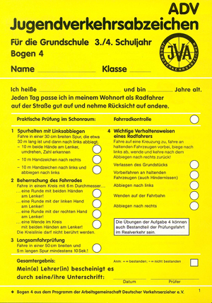 Beispielseite "Bogen 4"